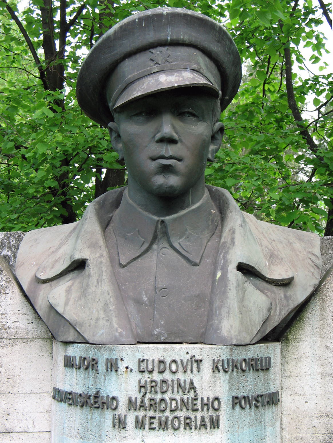 Bronzová busta hrdinu Slovenského národného povstania majora Ľudovíta Kukorelliho